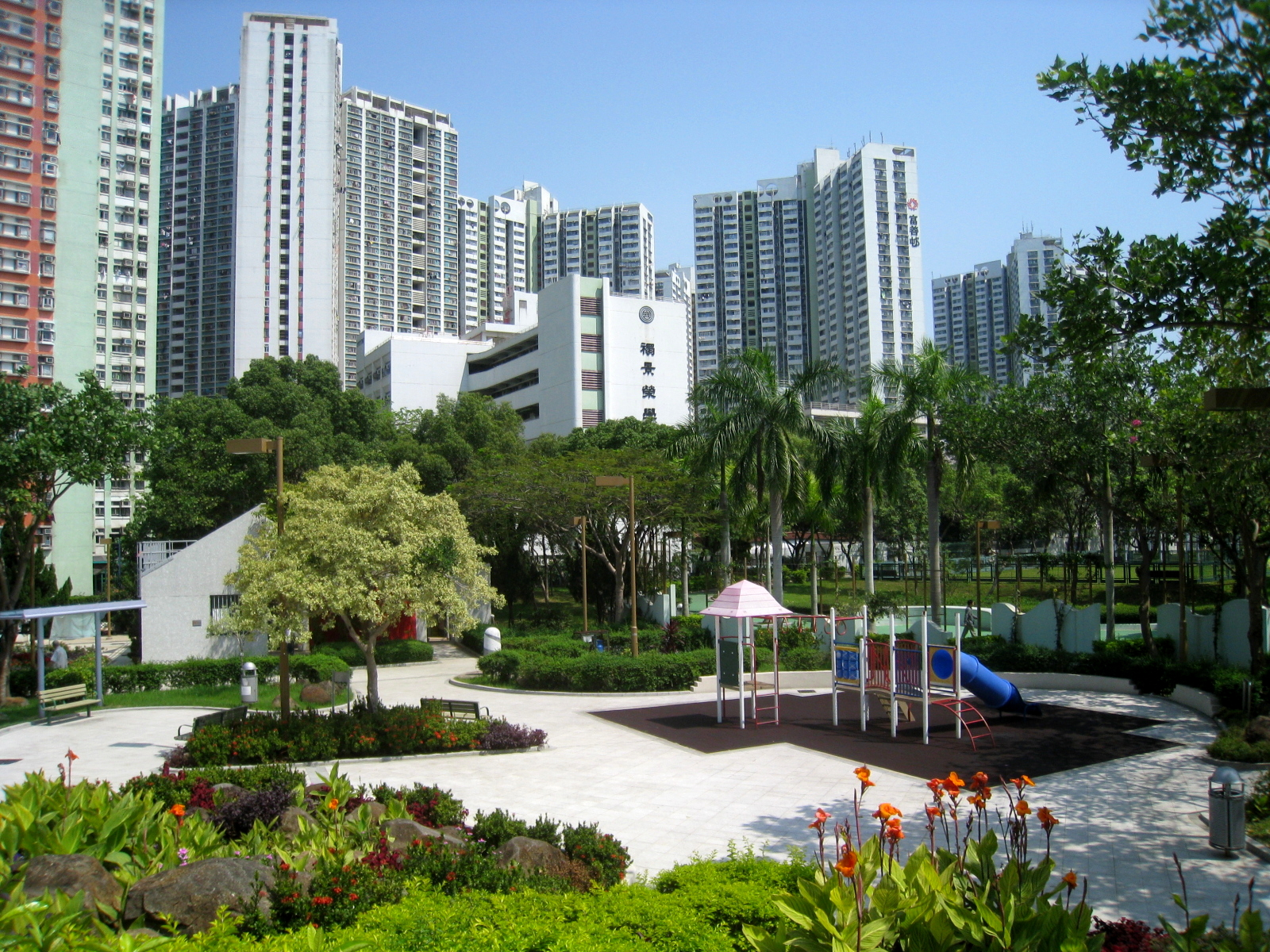 HK Yuen Shin Park 完善公園